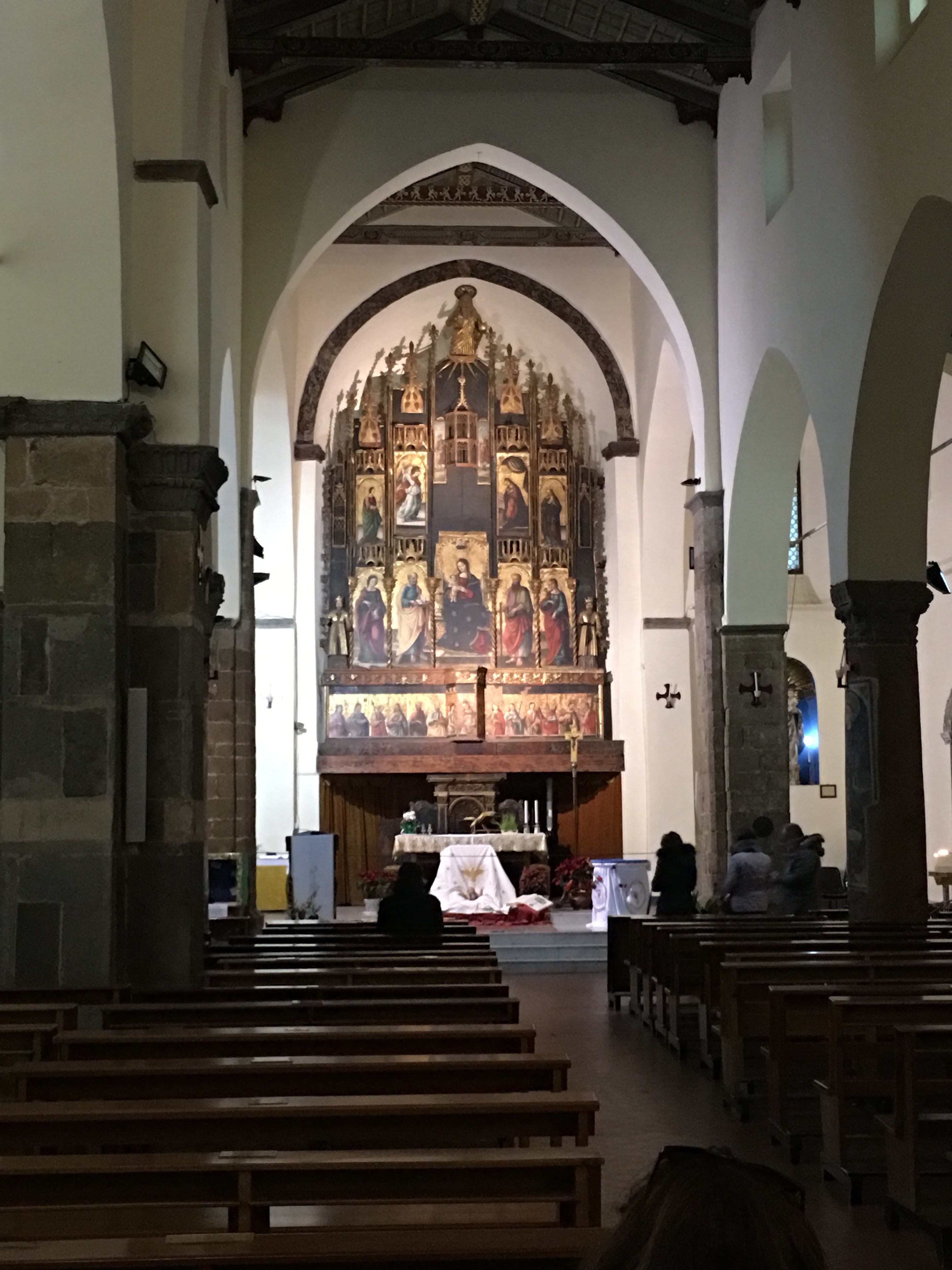 Gli interni della chiesa di Maria Santissima Assunta, o "matrice vecchia", a Castelbuono